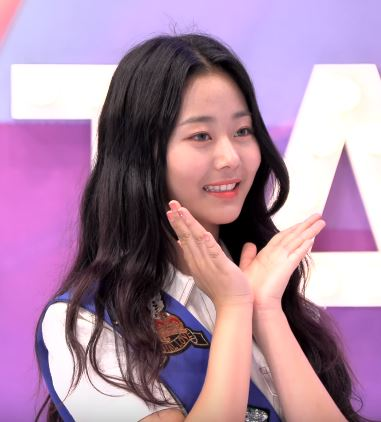 4일 오후 서울 마포구 상암동 tbs 오픈스튜디오에서 ‘tbs 팩트인스타 - ‘체리블렛’편 녹화가 펼쳐져 체리블렛 채린이 포토타임을 갖고 있다.